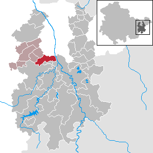 Zedlitz in Thuringia - District Greiz